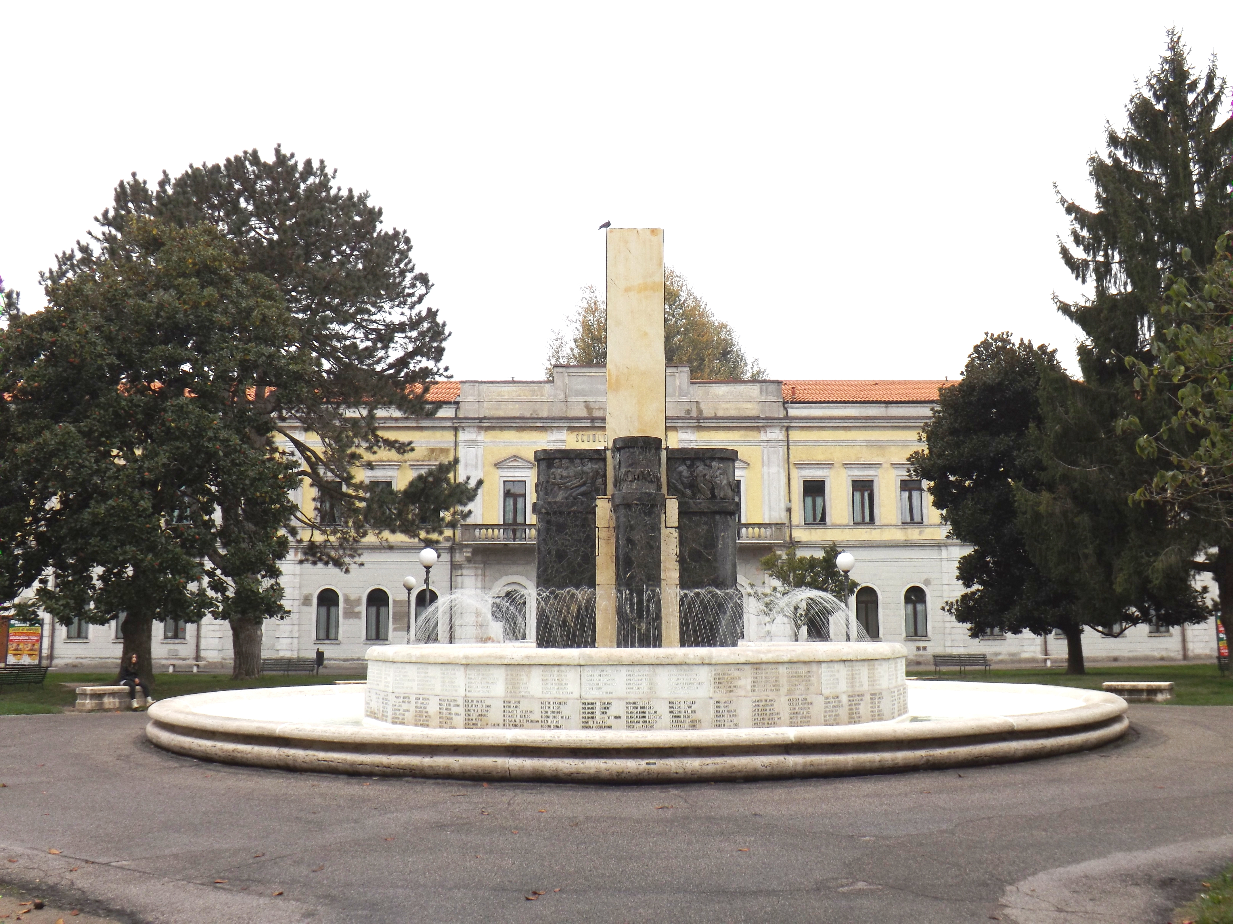 COPPARO FONTANA MONUMENTALE